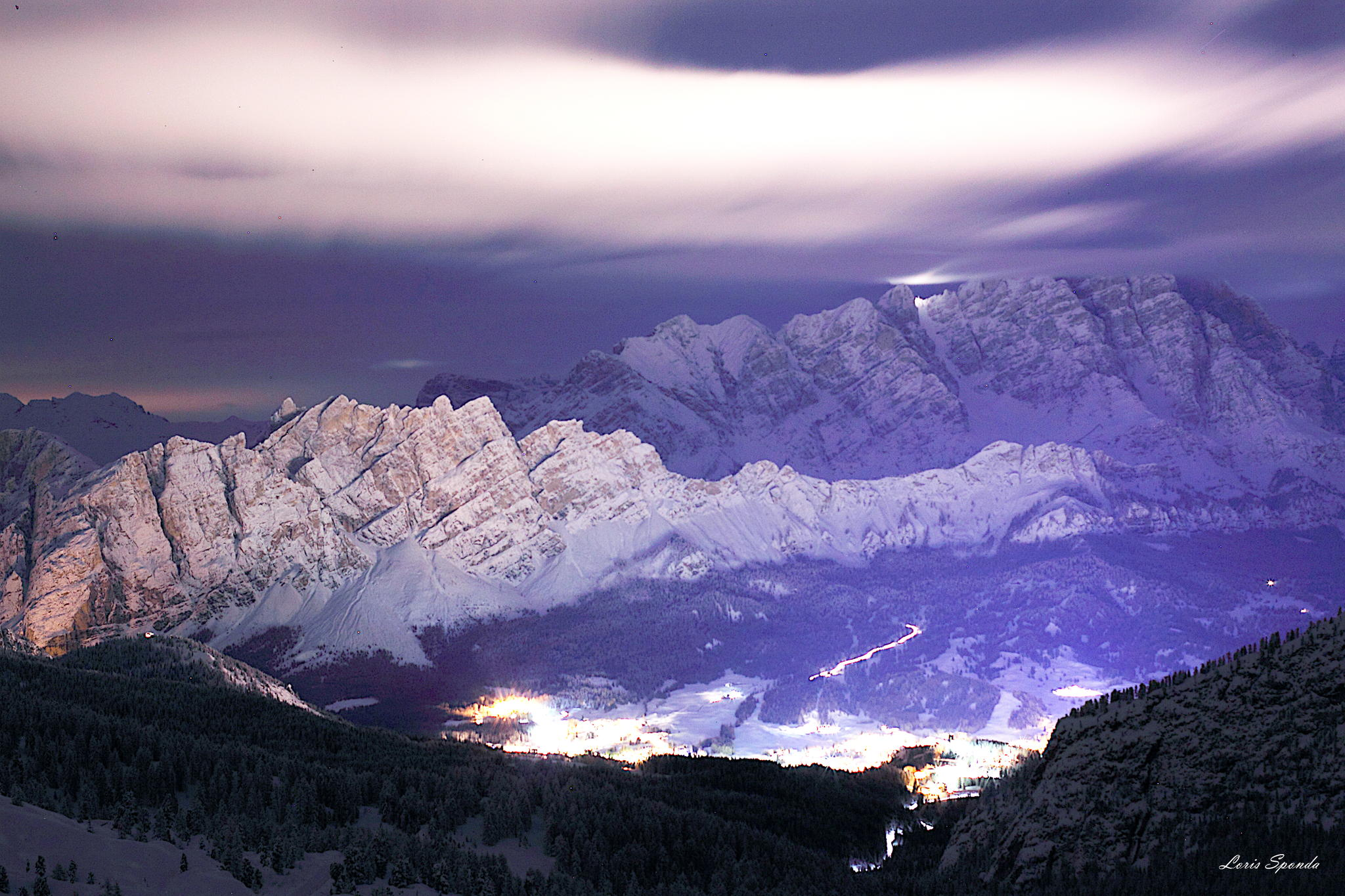 Альпы близ Кортины-д’Ампеццо